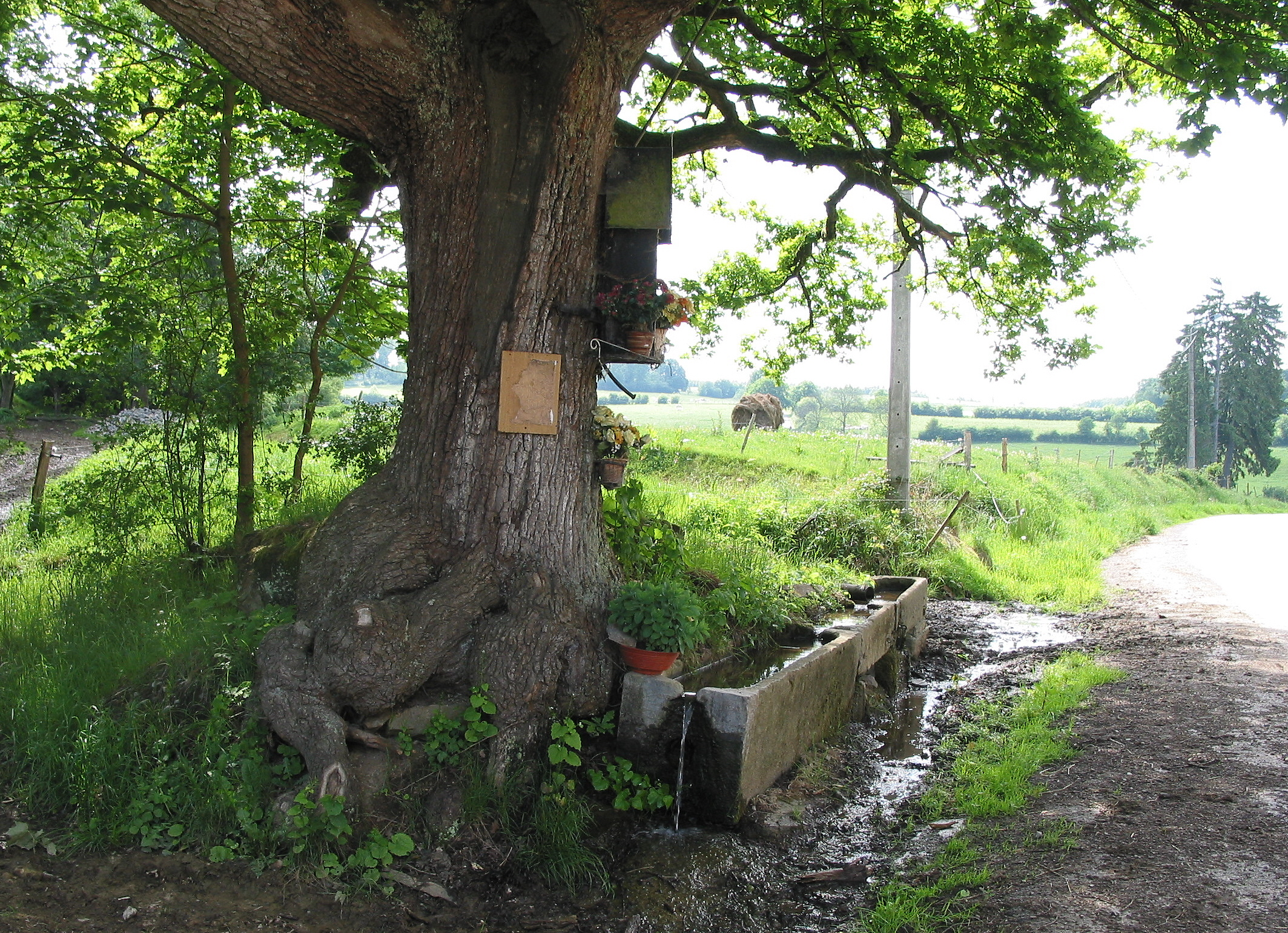 Amonines (Belgium), le chêne (Quercus robur) à la Vierge.